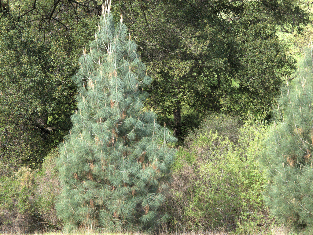 Pinus sabiniana—gray pine